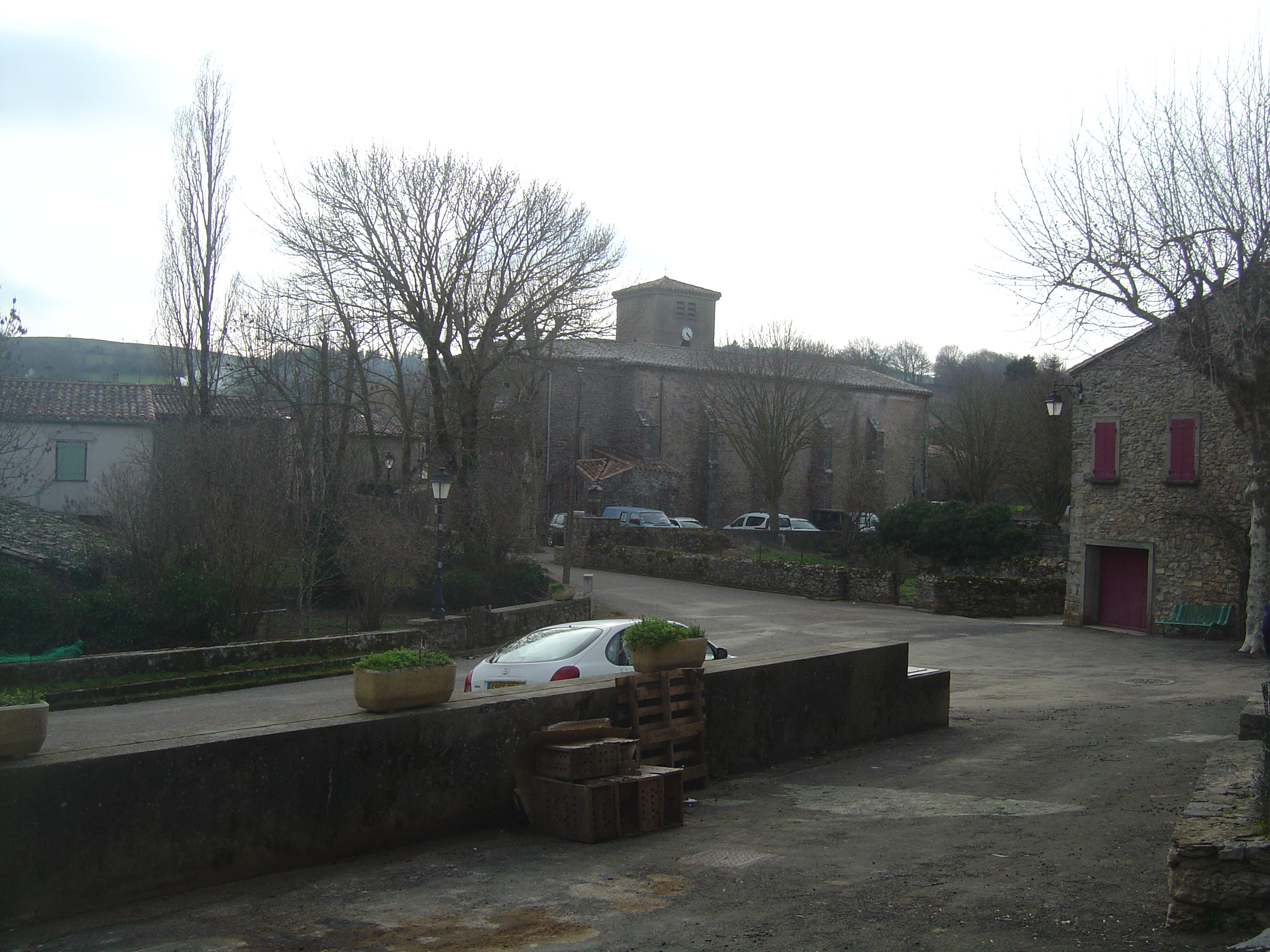 Eglise et centre du village de Bouisse